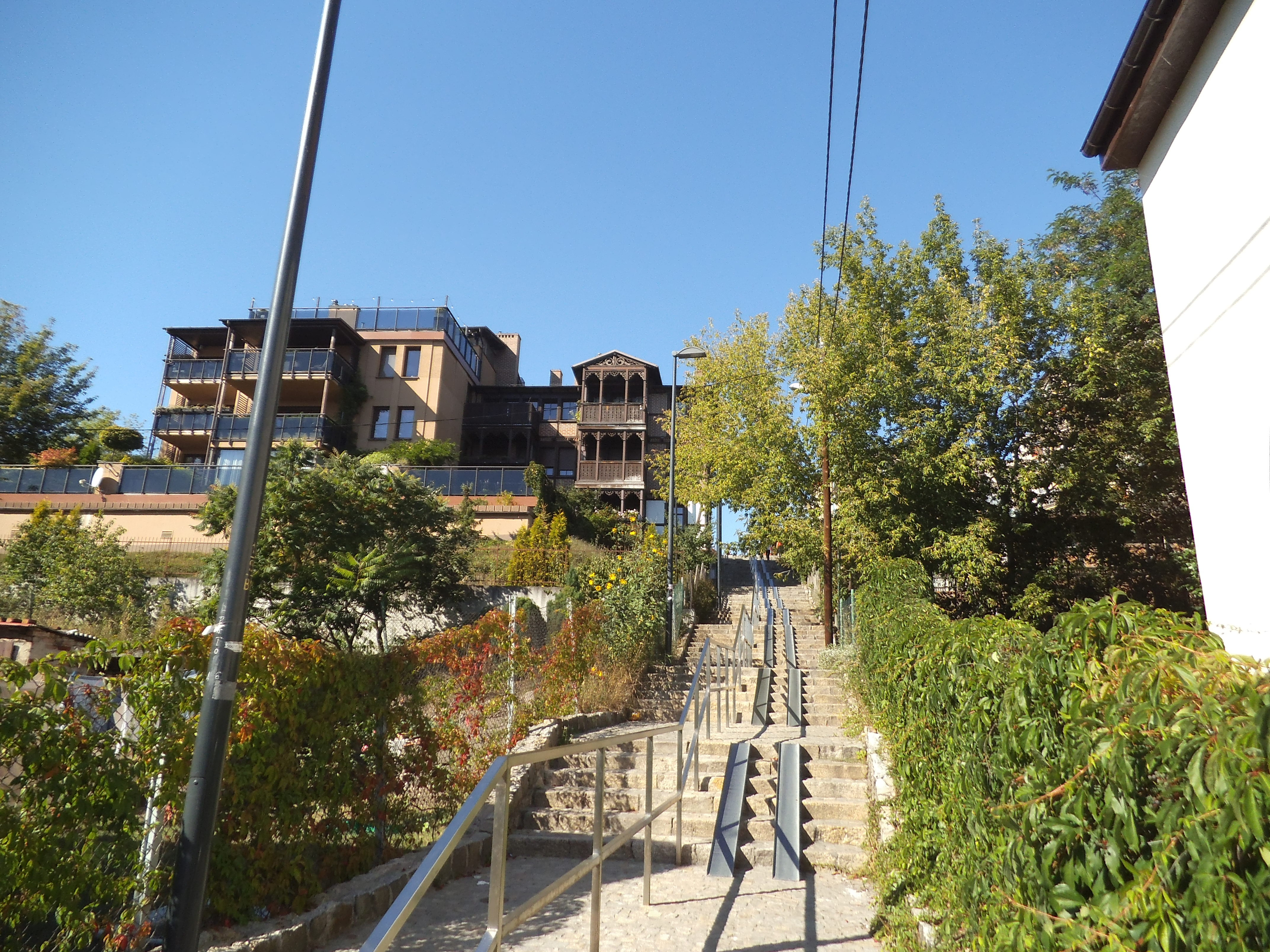 Ulica Ścieżka Szkolna w Toruniu